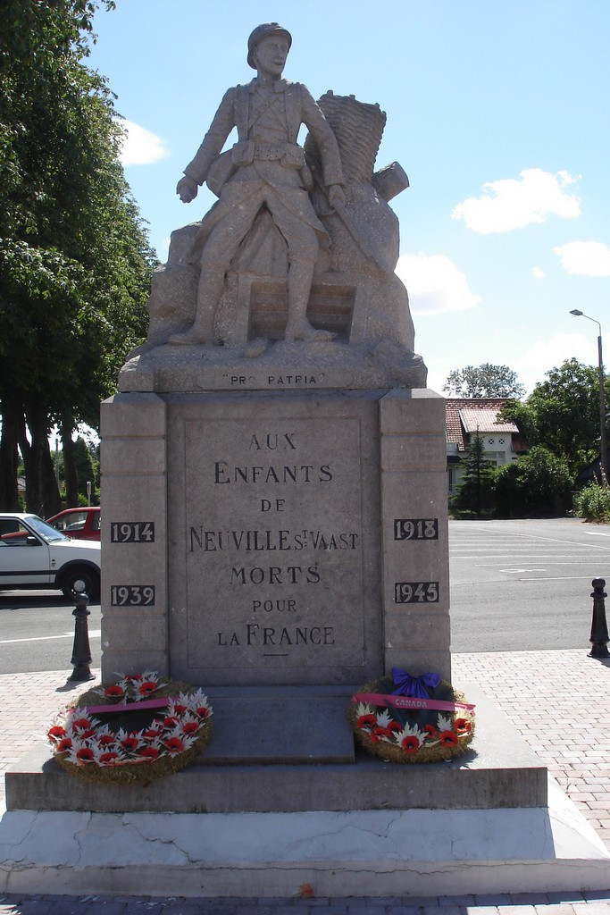 Photo prise par mes soins, il s'agit du monuments aux morts de Neuville-Saint-Vaast 62580 France